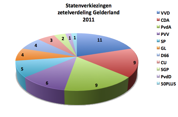 Uitslag provinciale statenverkiezingen Gelderland vertaald in zetels